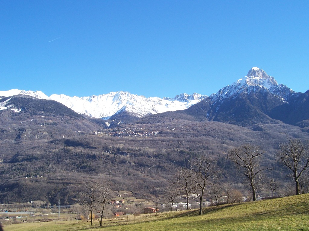 Tredenus, Val Camonica, Italia